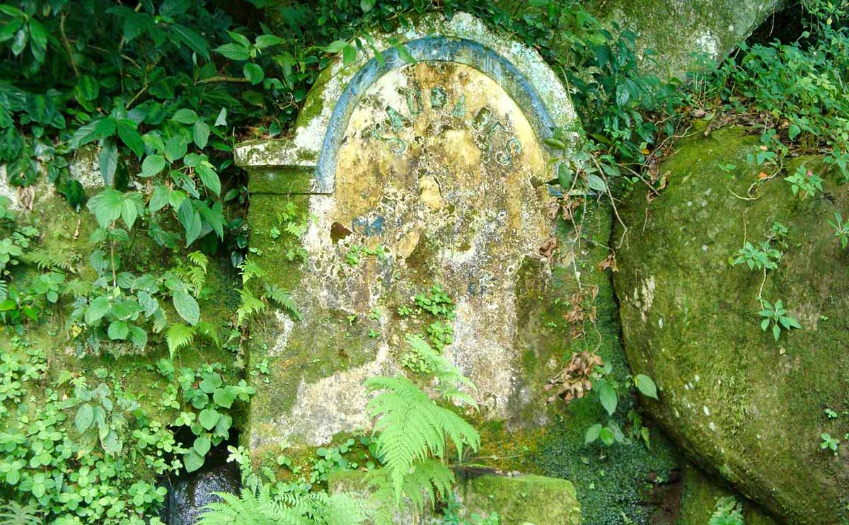 Fonte da Saudade, construida em julho de 1843 e concluida em 13 dezembro de 1843. A fonte serviu ao povo como uma das alternativas para abastecimento de água potável, lavar roupas, e local de lazer da sociedade iguapense.